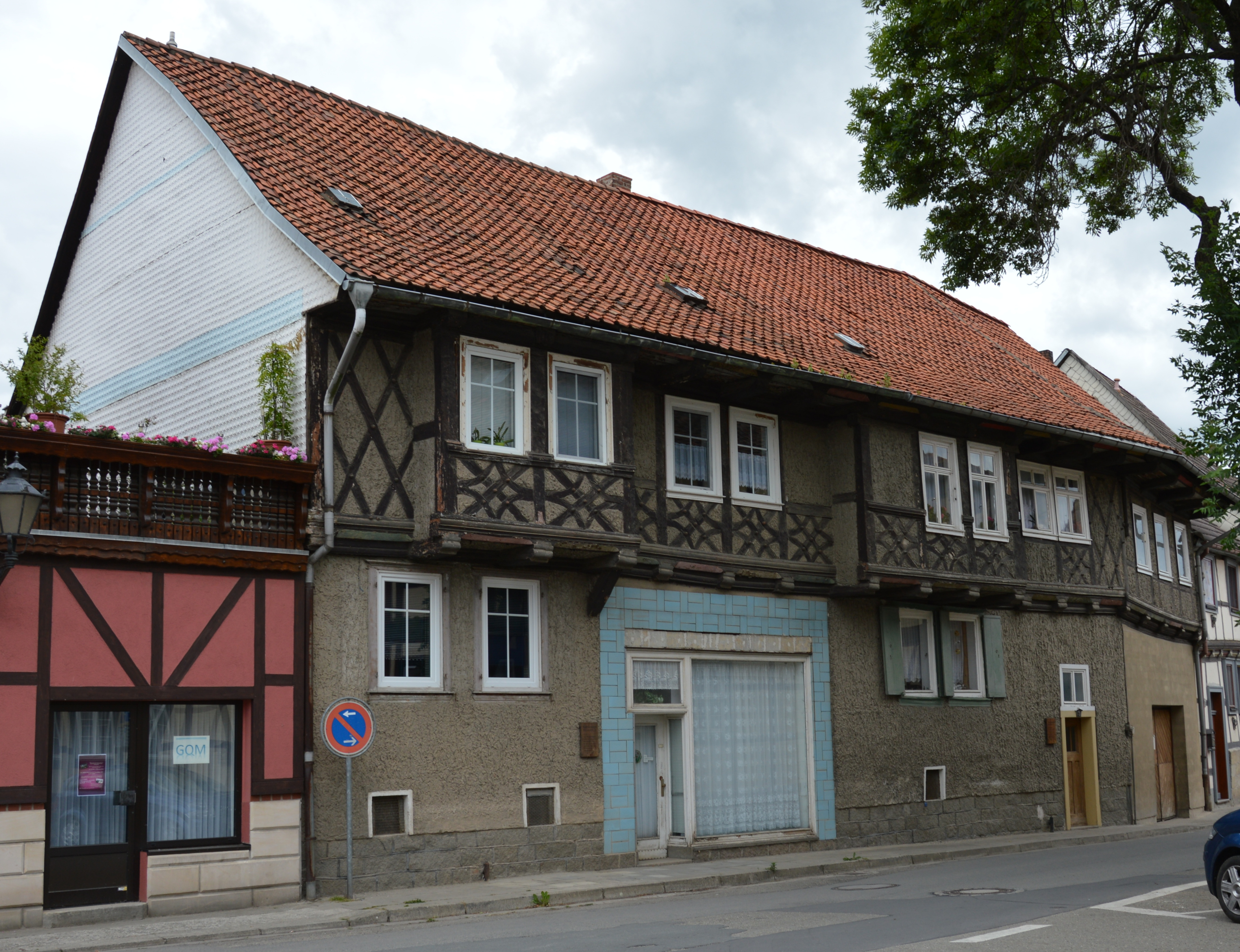 Haus Kornstraße 3 in Derenburg